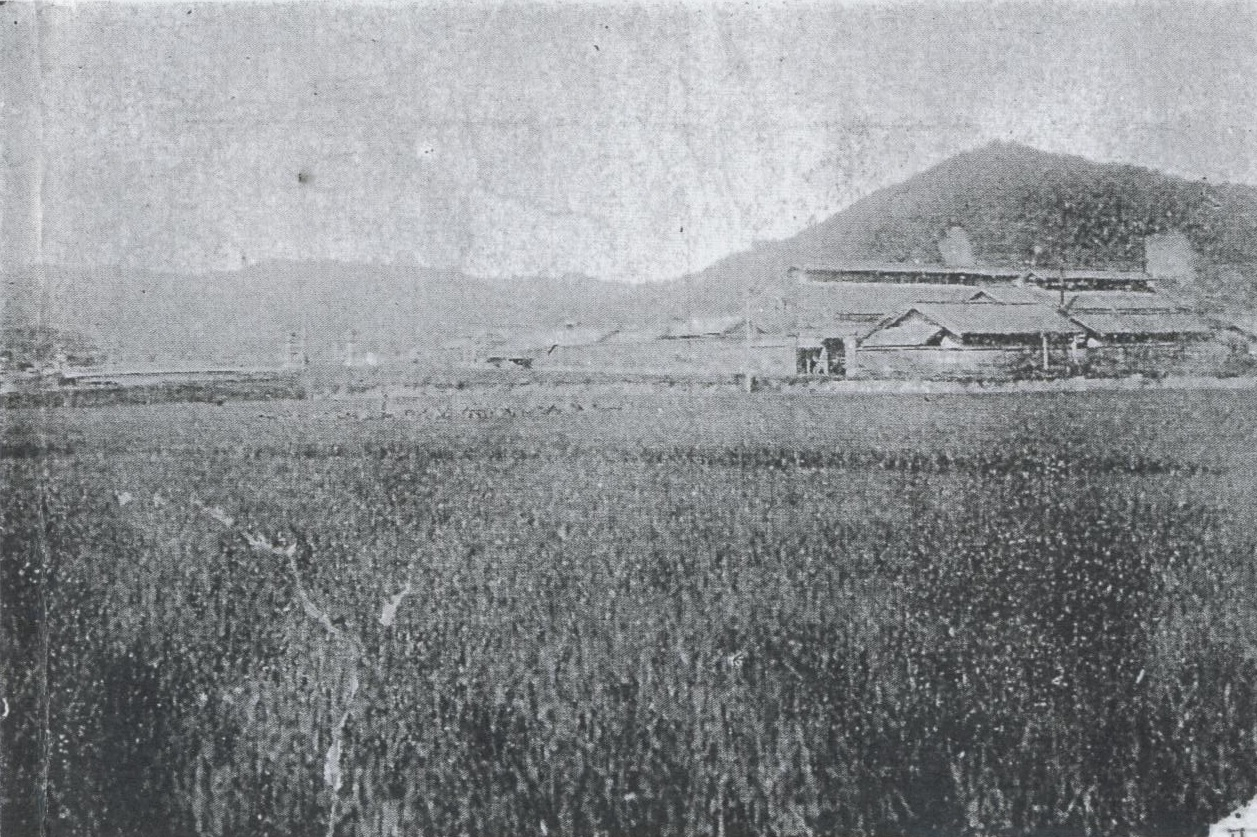 鹿児島県鹿児島郡伊敷村下伊敷付近。